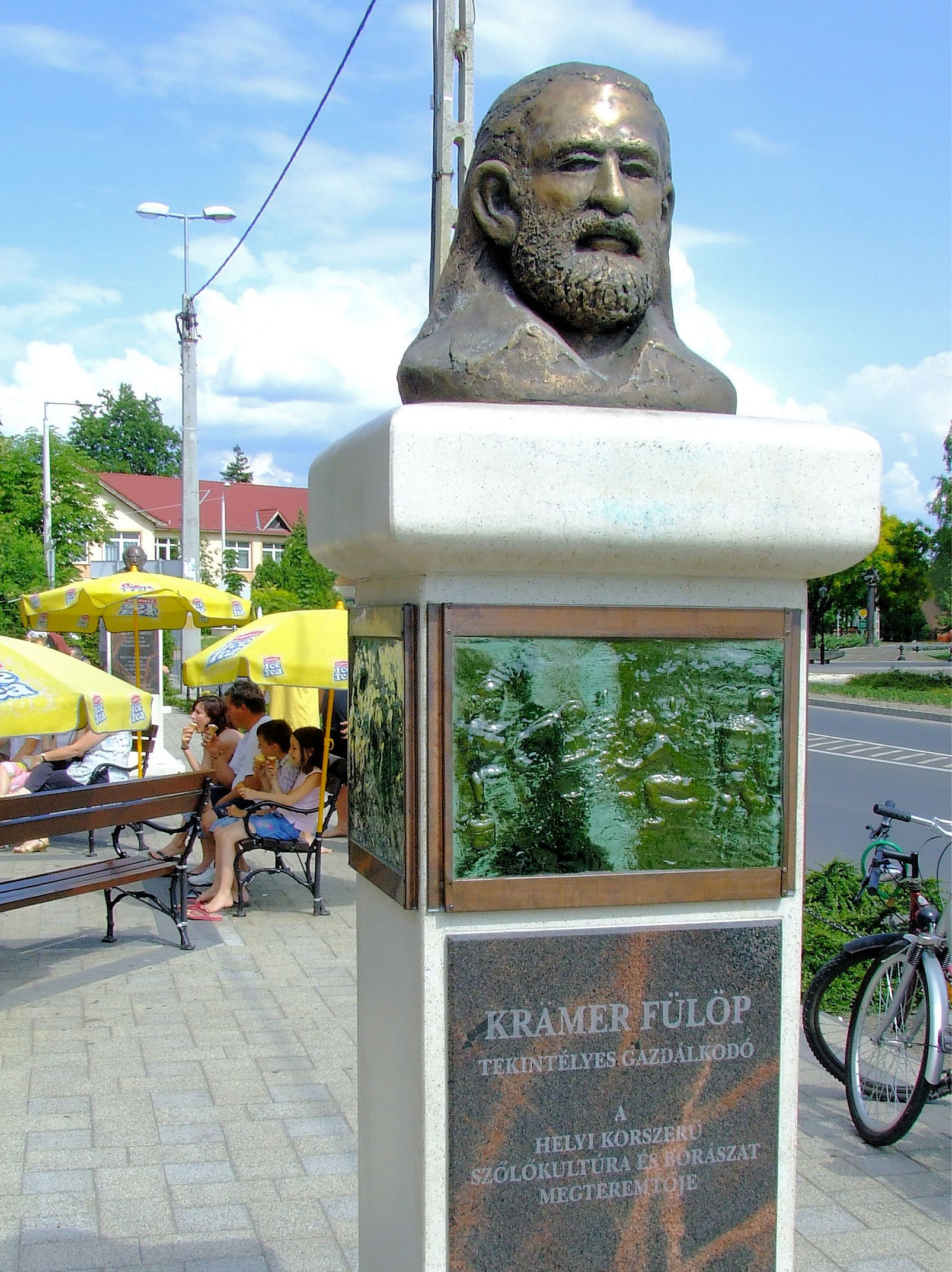 Krämer Fülöp szobra Soltvadkerten. Windecker Zoltán alkotása